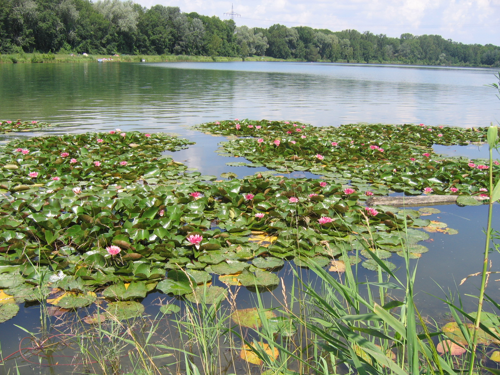 Seerosen auf dem Joshofner Weiher, einem Baggersee im Landschaftsschutzgebiet Schutz der Donauauen östlich der Stadt Neuburg (LSG-00400.01).